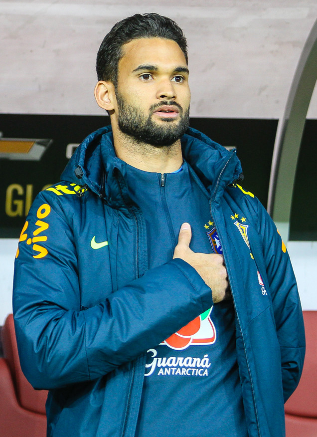 Россия проиграла Бразилии со счетом 0:3